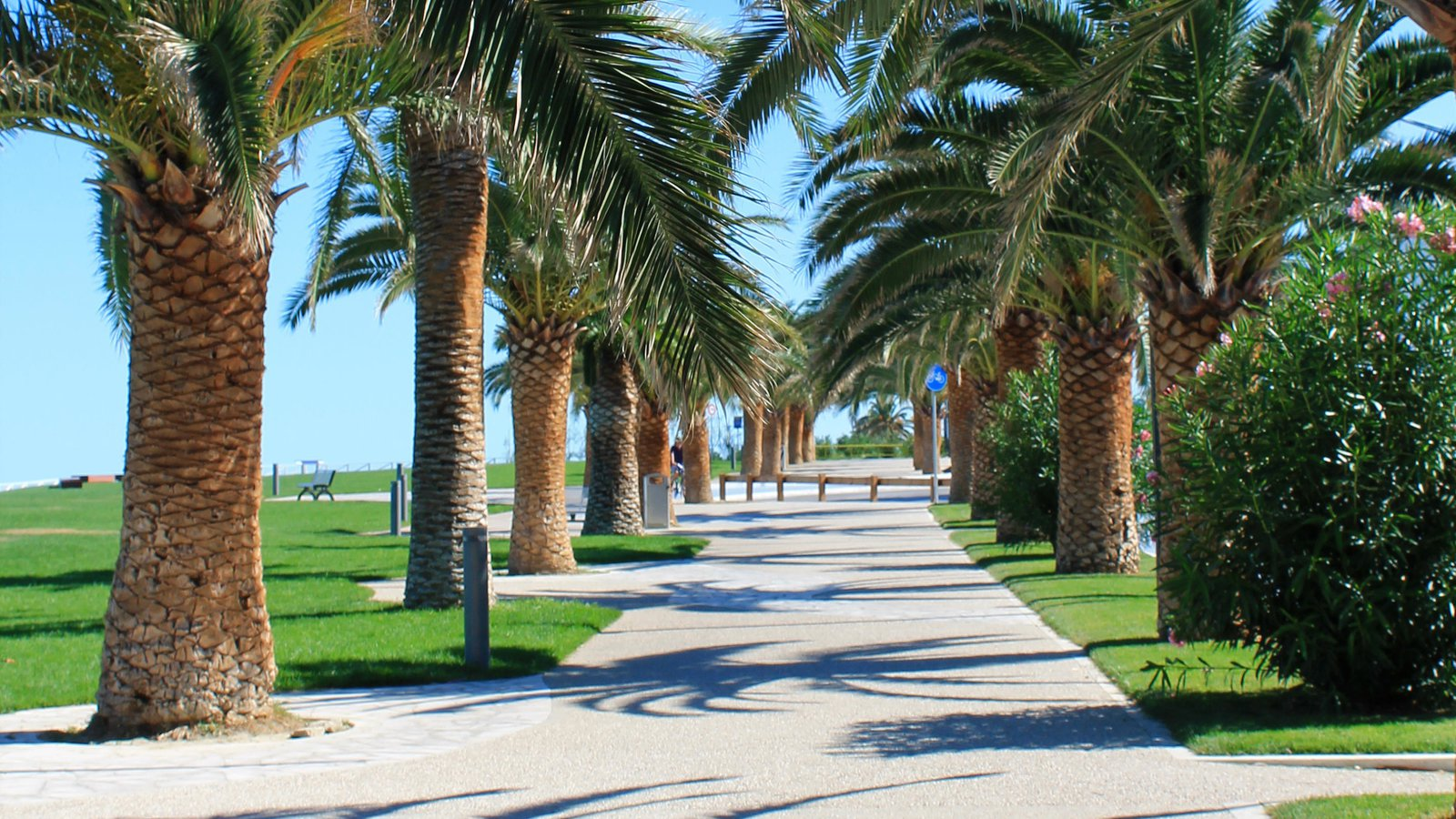 Il nuovo tratto del lungomare - nord di Grottammare